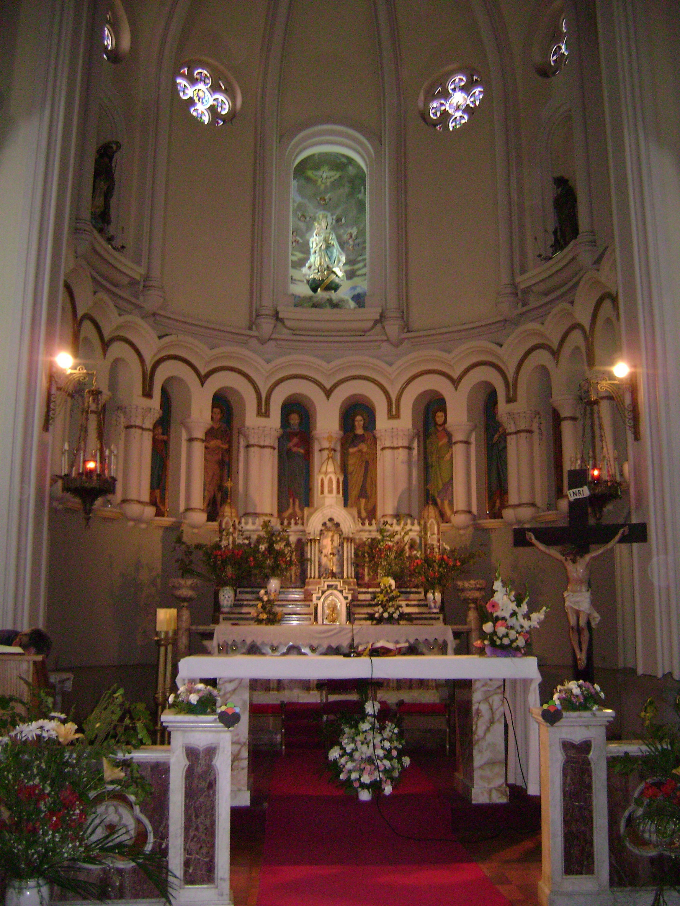 Parroquia Santo Cristo de la Salud, de los Religiosos Pasionistas. Los Andes.